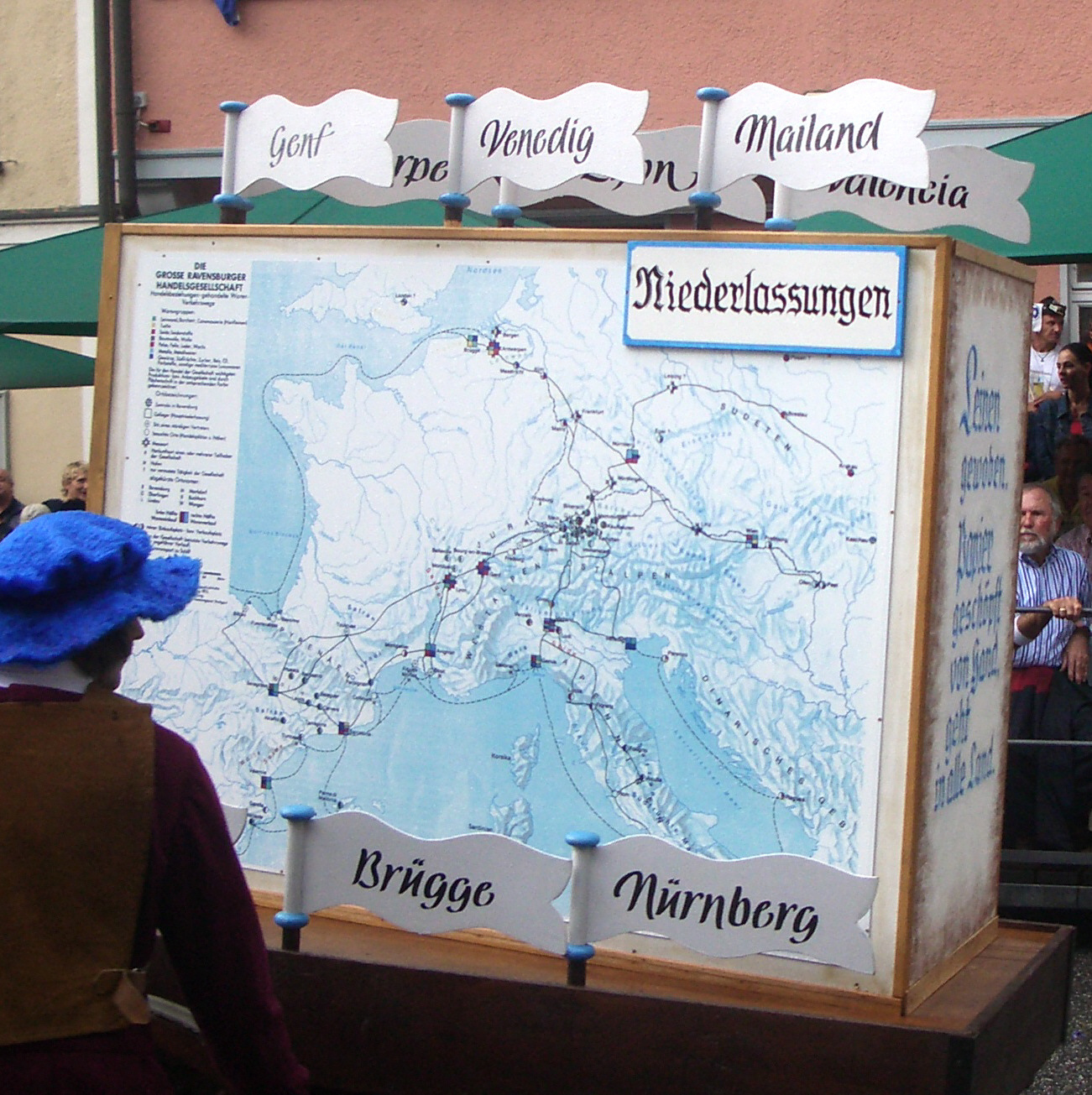 Ravensburg, Germany: Rutenfest, Festzug am Rutenmontag, Karte der Niederlassungen der Großen Ravensburger Handelsgesellschaft